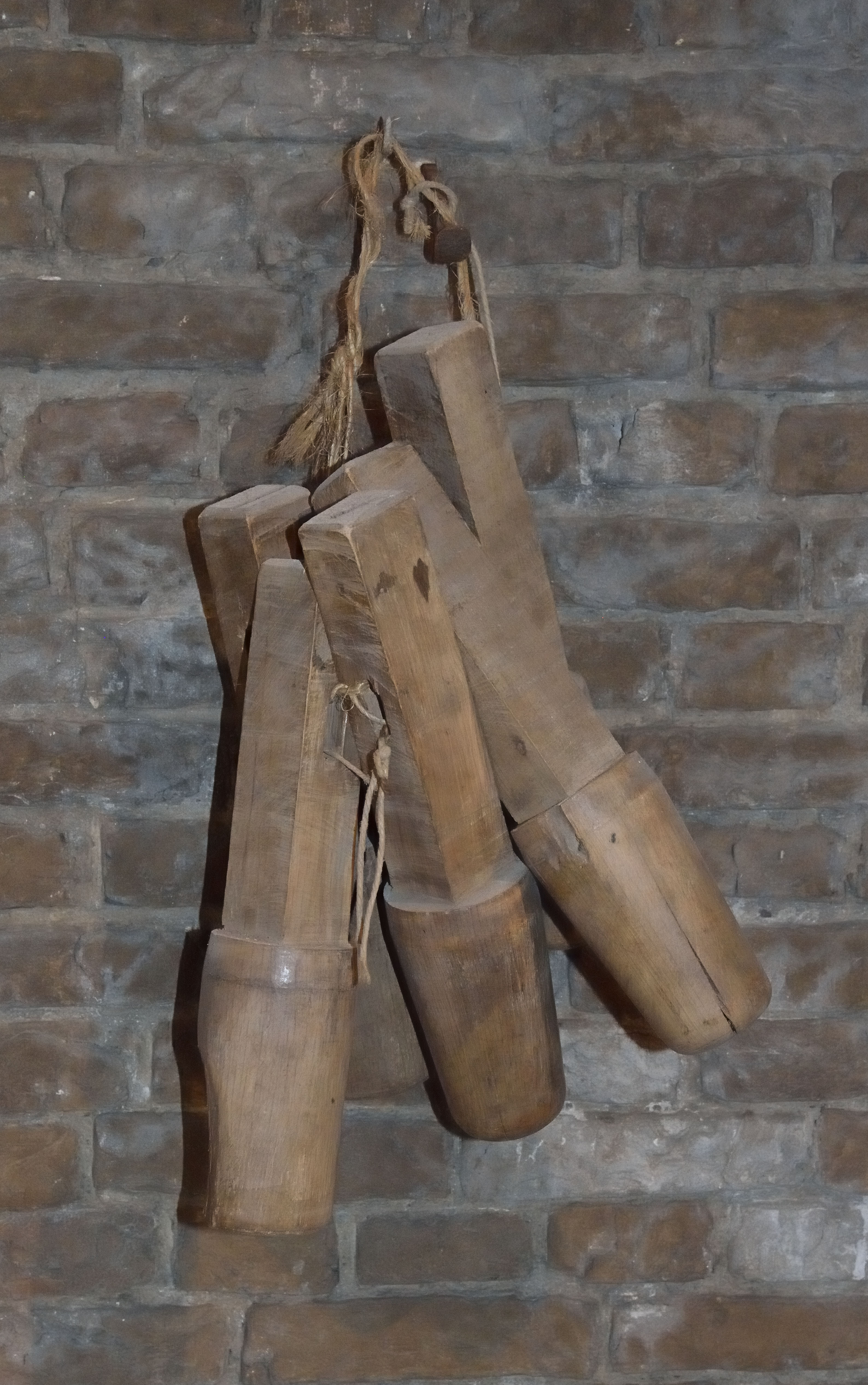 Molen De Valk, Leiden, dollen